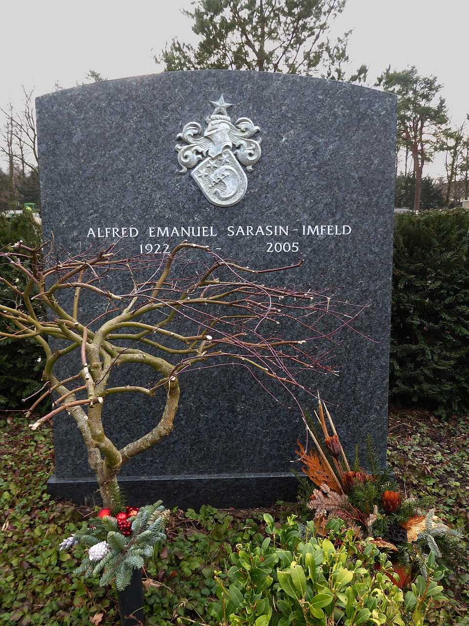 Alfred Emanuel Sarasin-Imfeld (1922–2005) Bankier, Politiker, Grab auf dem Friedhof Hörnli, Riehen, Basel-Stadt